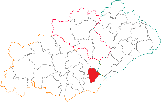 Situation du canton dans le département de l'Hérault.